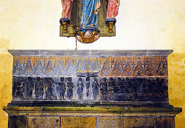 Runan. Iliz. Stern-aoter